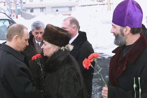 ТАЙМЫРСКИЙ (ДОЛГАНО-НЕНЕЦКИЙ) АВТОНОМНЫЙ ОКРУГ. С председателем Совета ветеранов Великой Отечественной войны города Норильска Натальей Голубятниковой и настоятелем храма Всех Скорбящих Радость отцом Сергием во время посещения мемориального комплекса памяти жертв «Норильлага».